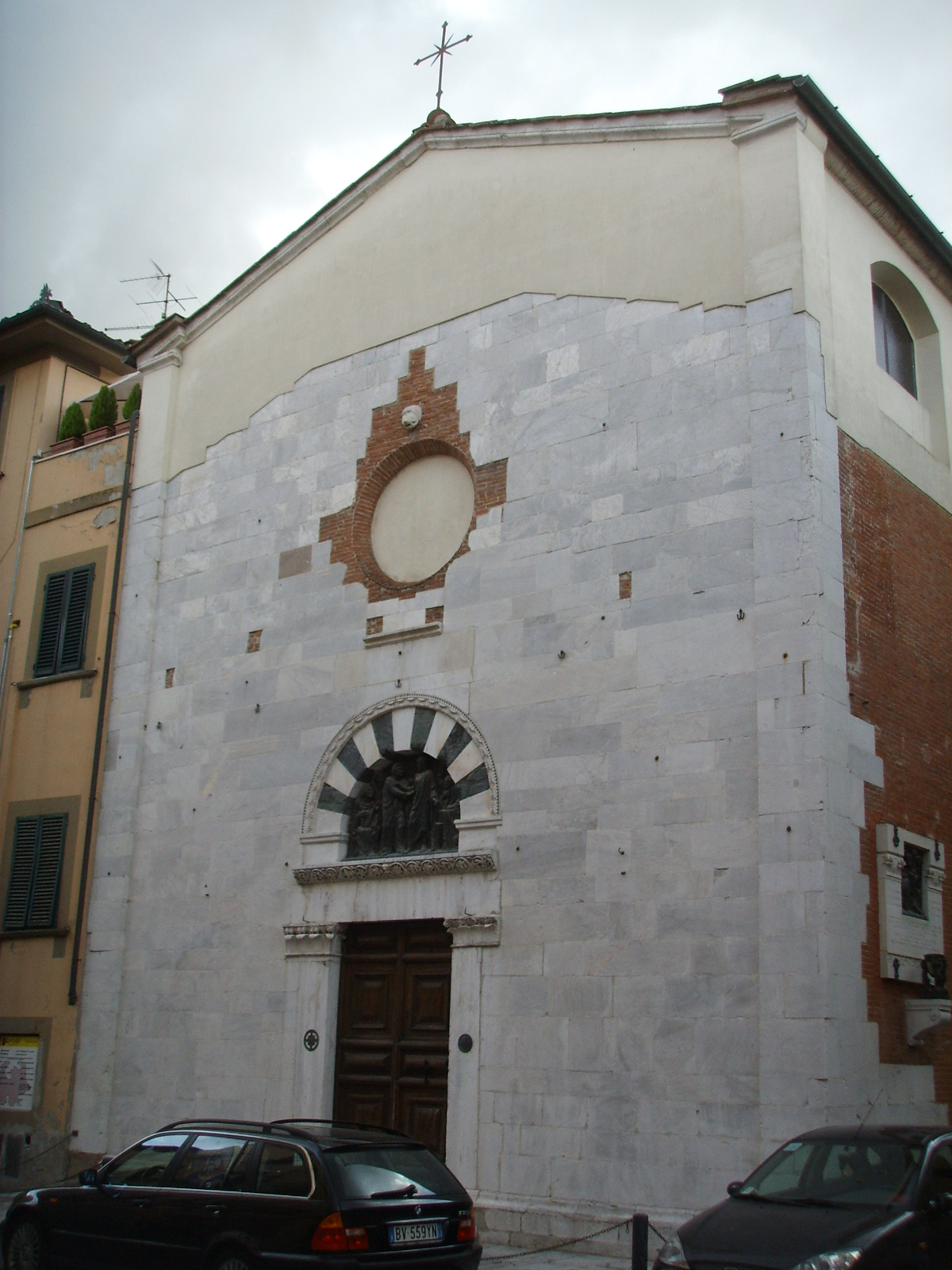 Chiesa di san tommaso, lucca